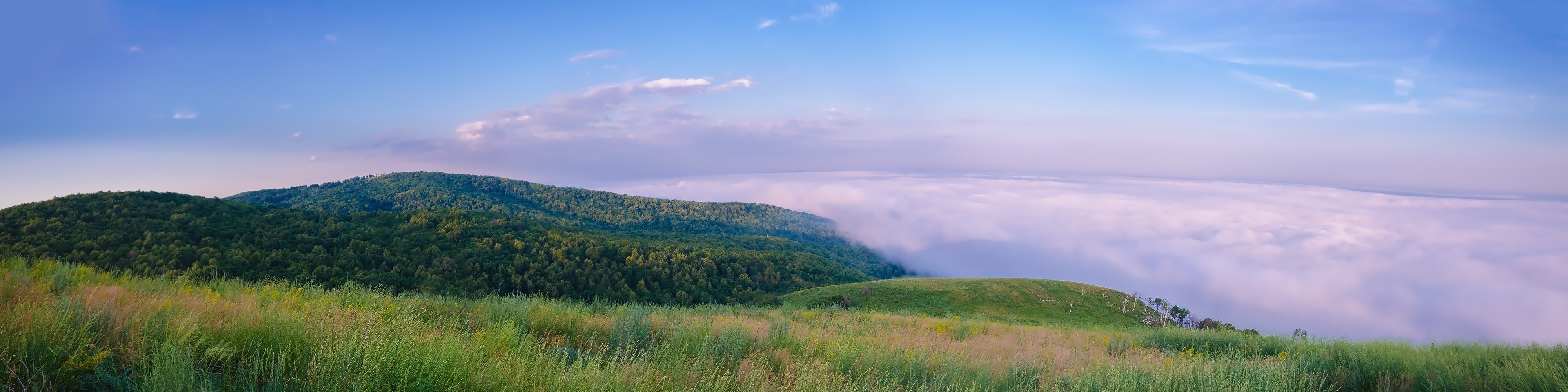 Утренний туман около села Верхнеиткулово, Ишимбайский район Башкортостана.